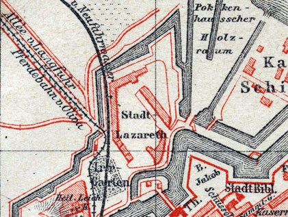 Danzig Stadt-Lazareth.